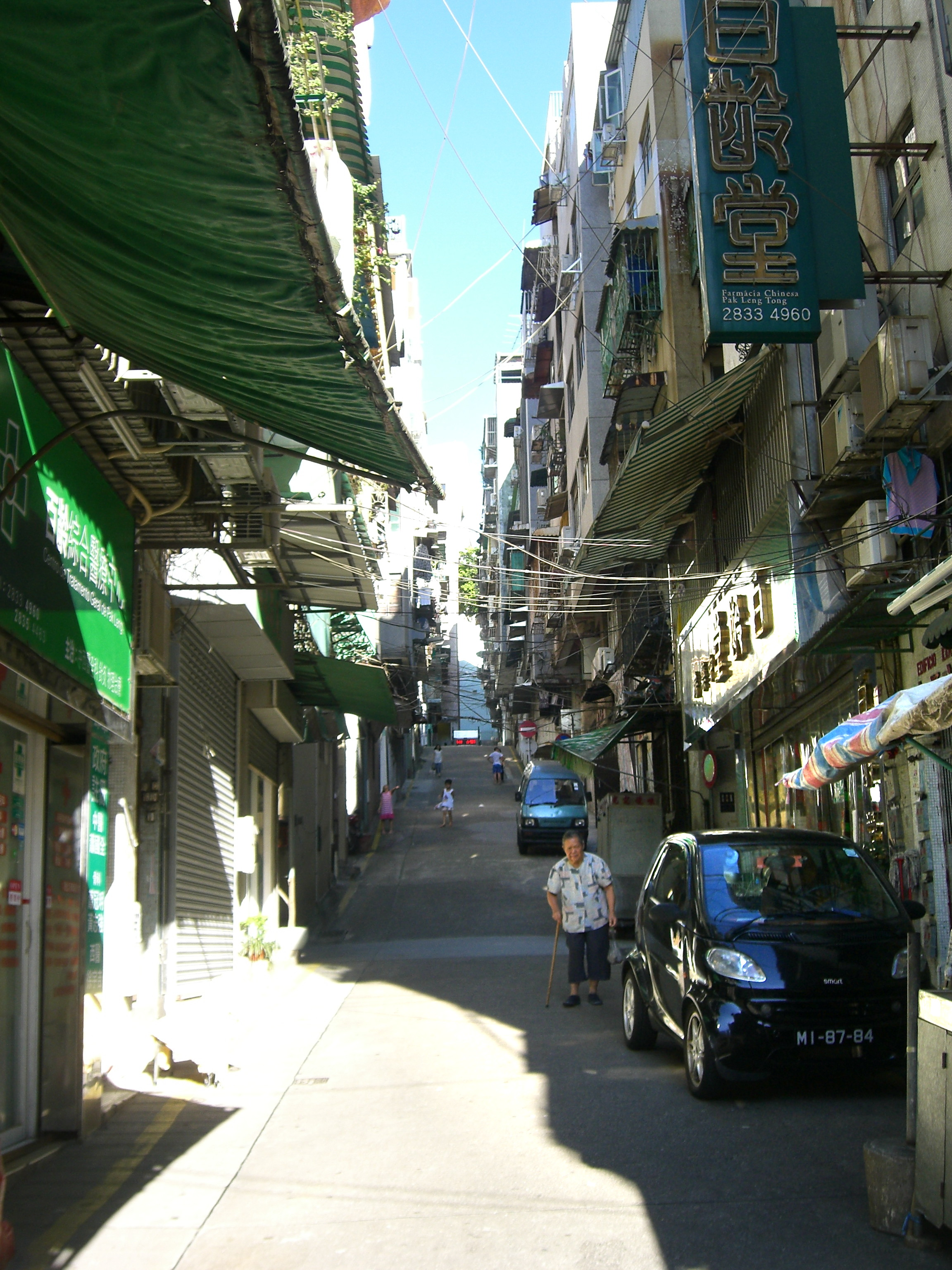 Rua da Surpresa